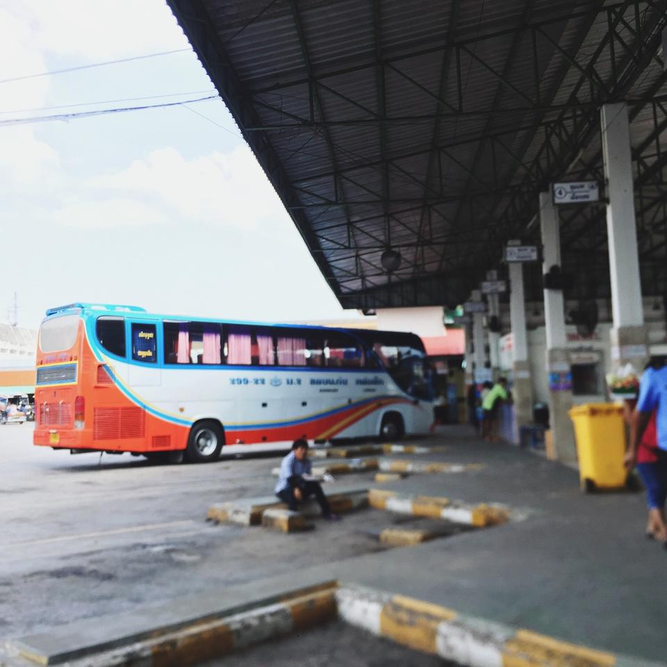 ภาพถ่ายภายในสถานีขนส่งอำเภอชุมแพ